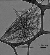 Carbon nanotubes